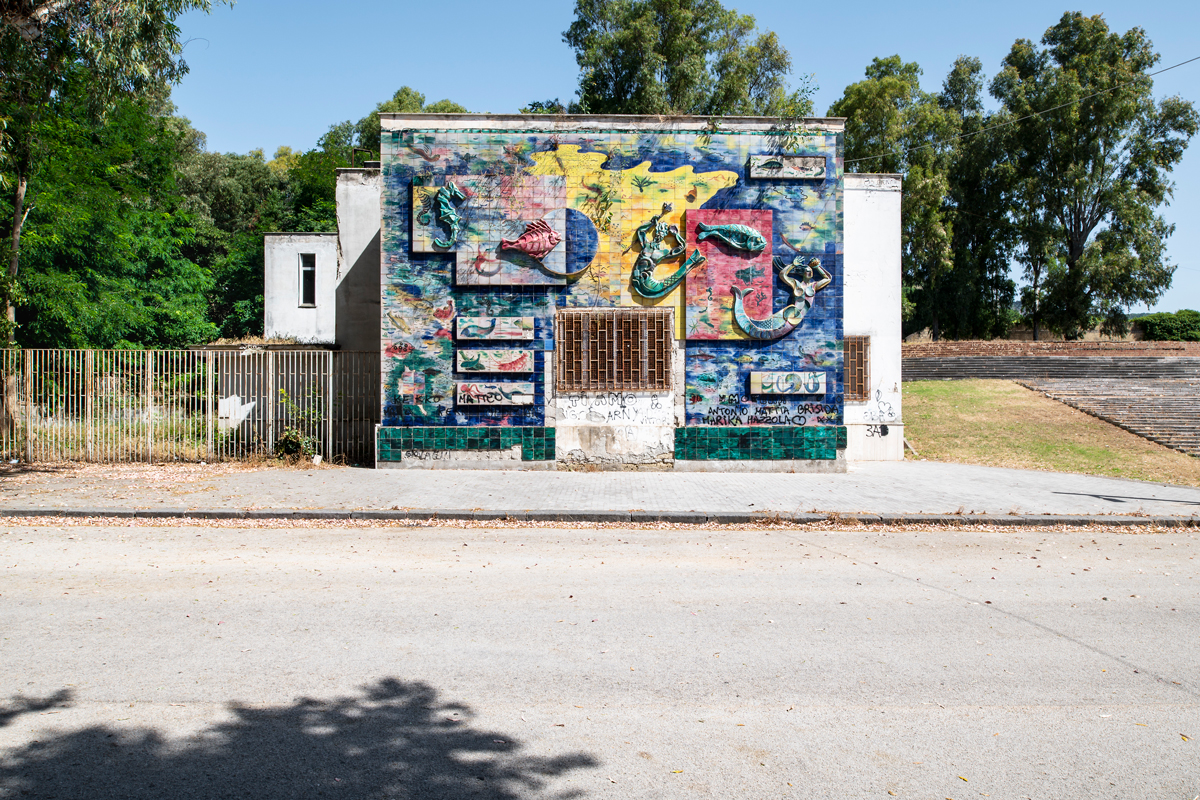 Prospetto dell'acquario tropicale manomesso da interventi incongrui posteriori.